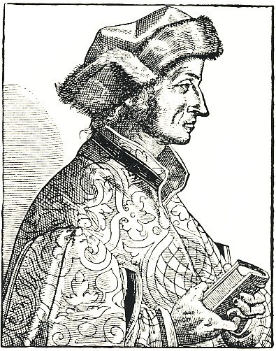 Holzschnitt Sebastian Brants aus Reußners Icones, 1590.